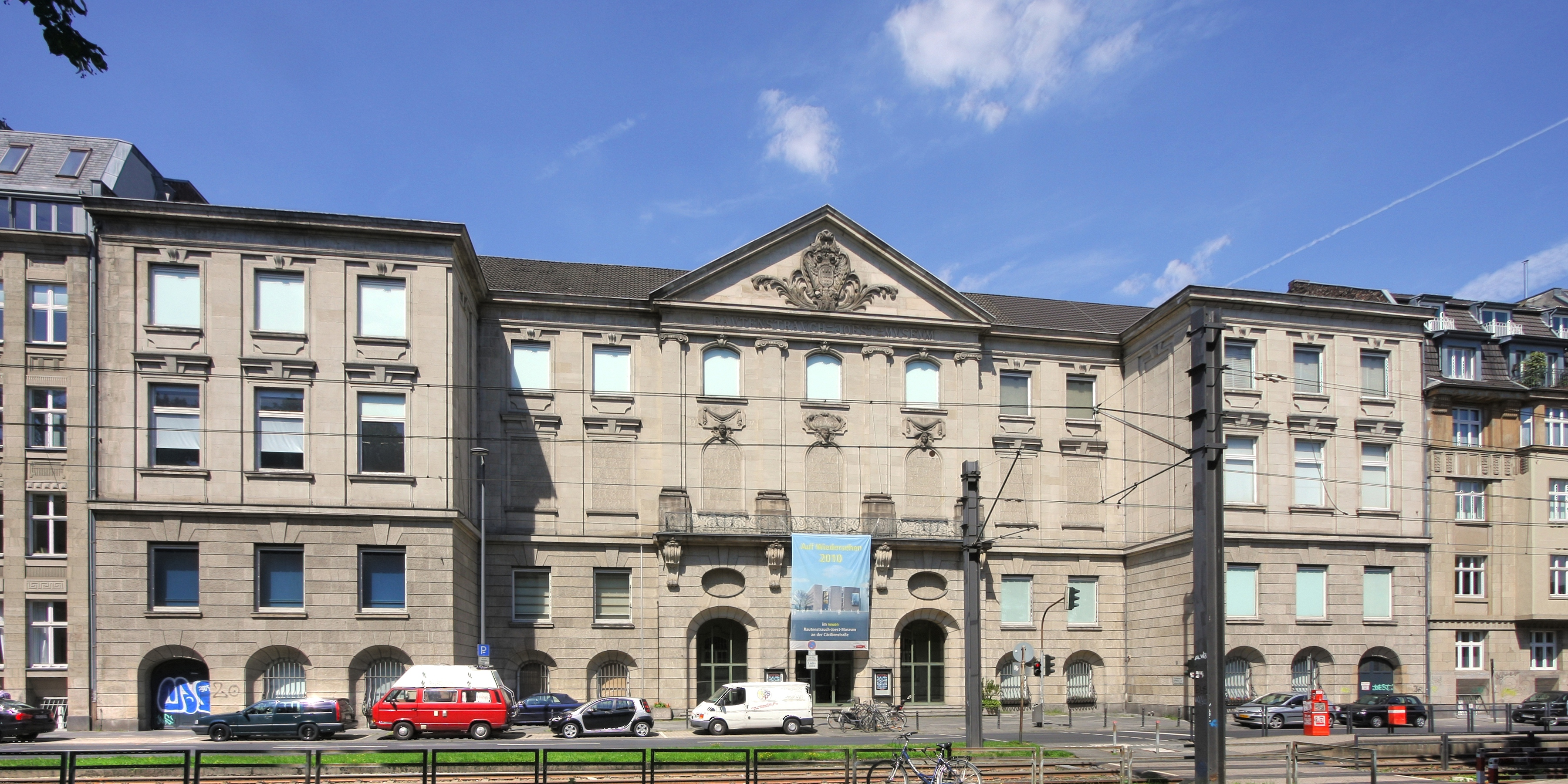 Ehemaliges Gebäude des Rautenstrauch-Joest-Museum, Frontansicht. Im Herbst 2010 hat das Museum seine neuen Räume im „Kulturzentrum“ an der Cäcilienstraße, Nähe Neumarkt, bezogen.